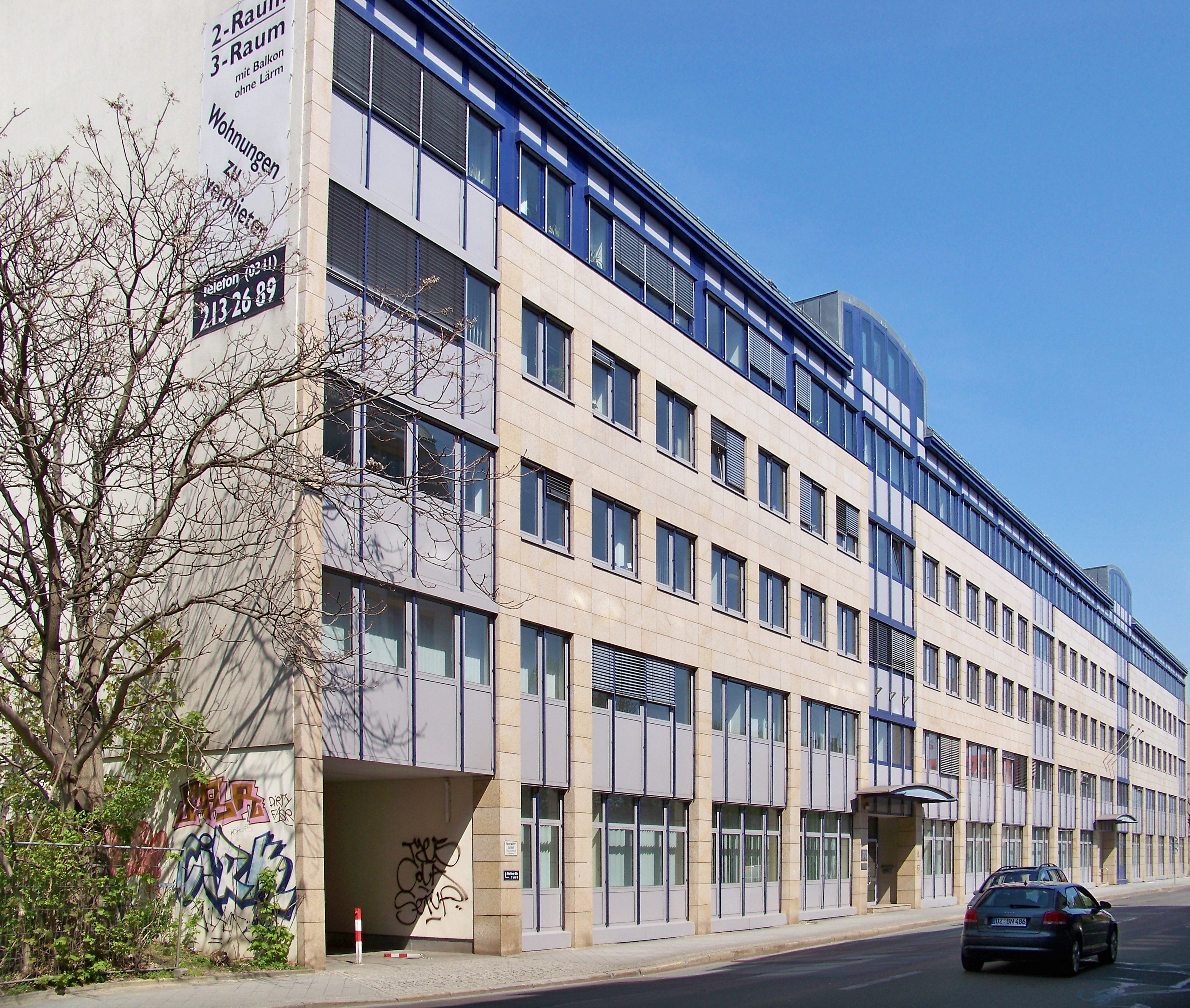 Sozialgericht Leipzig in der Berliner Straße 11